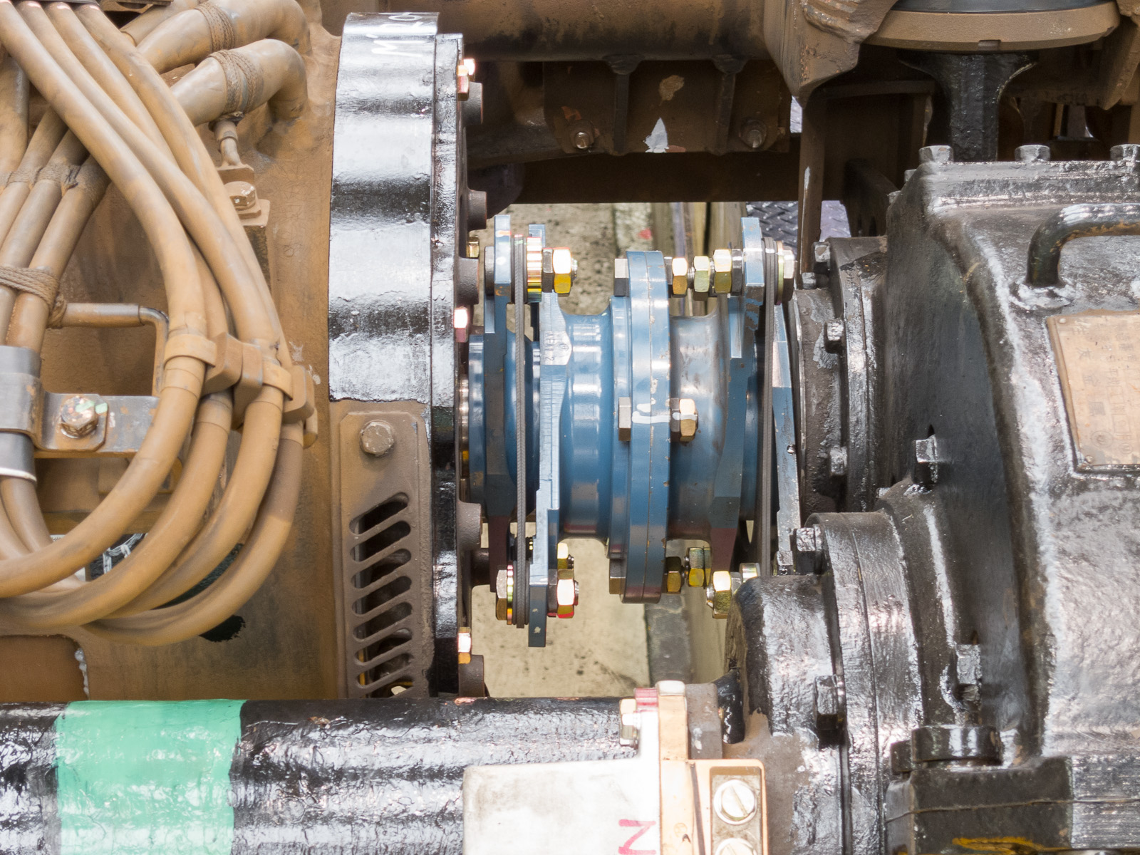 JR東日本205系5000番台のDT70形台車。交流誘導電動機化、TD平行カルダンに改造。